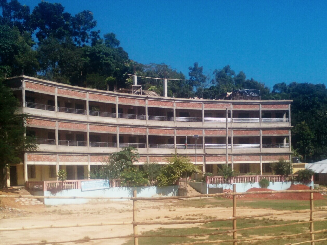 মেহেরুন্নেসা বালিকা বিদ্যালয় ২